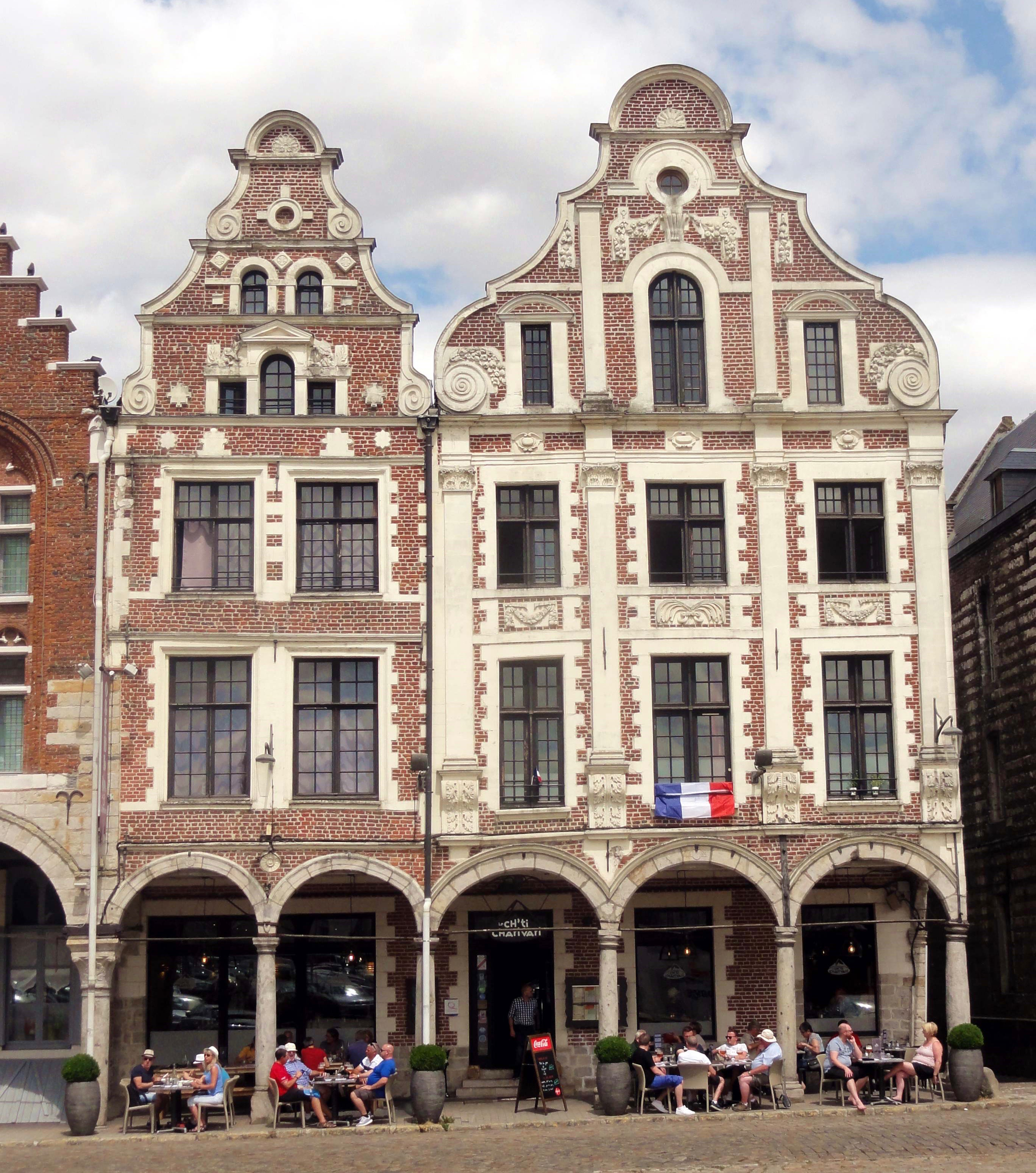 La Grand'Place d'Arras.